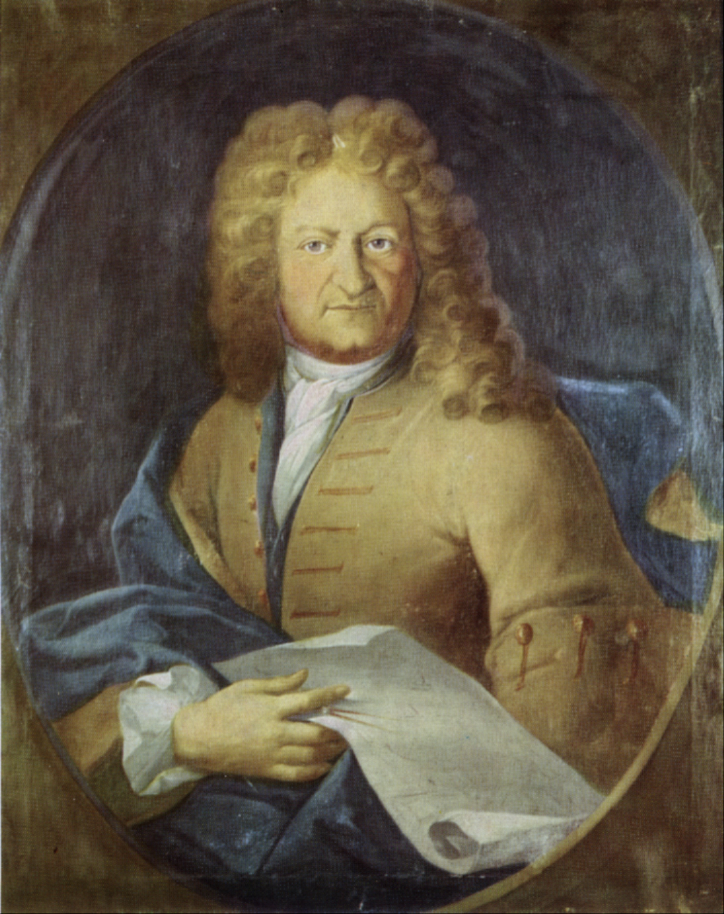 Franz Beer II von Bleichten, Portrait von Jacob Carl Stauder (Onken Nr. B38); Konstanz, Privatbesitz Dr. Ulrich Leiner (Stand: 1972)